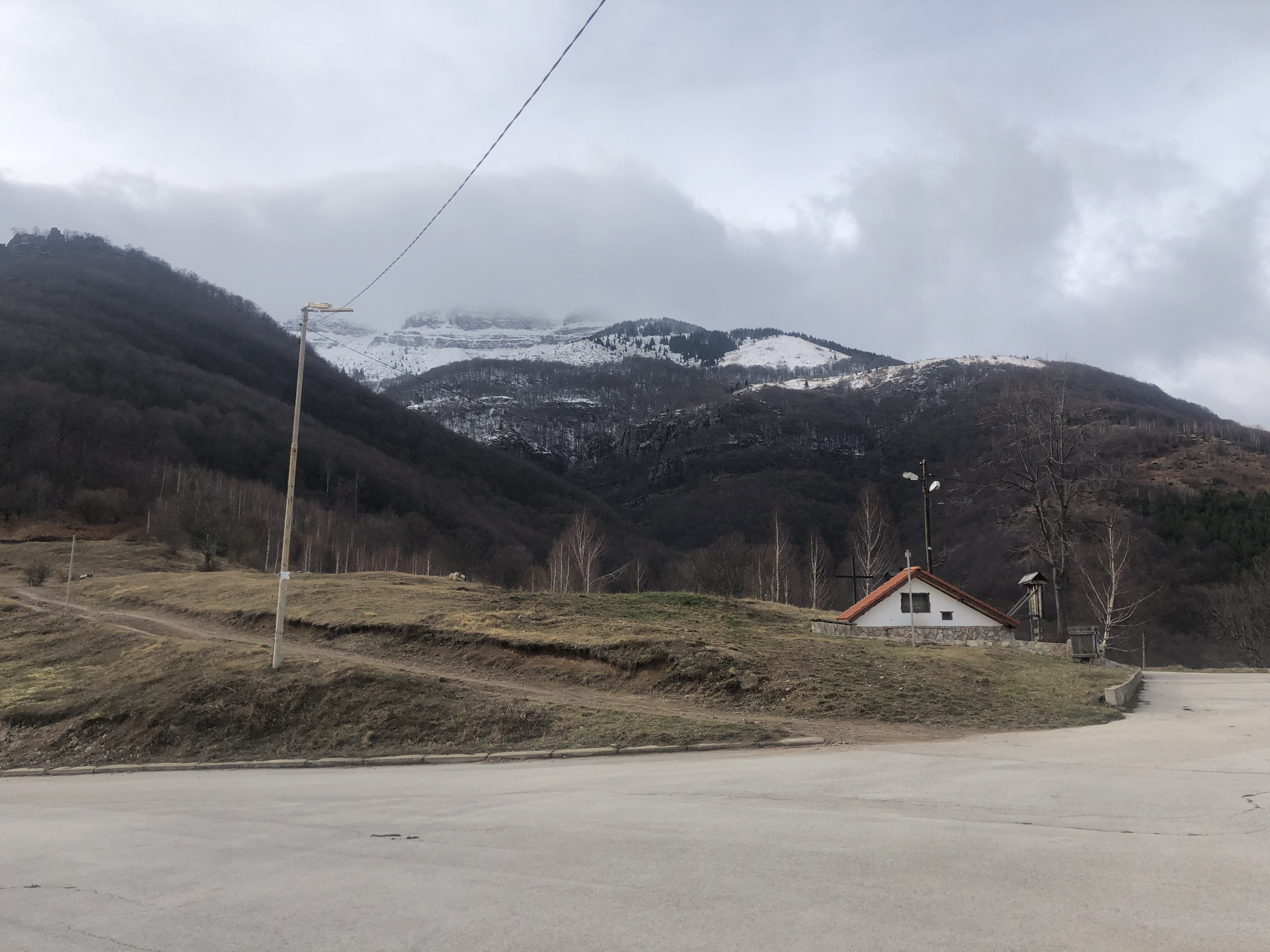 Връх Копрен